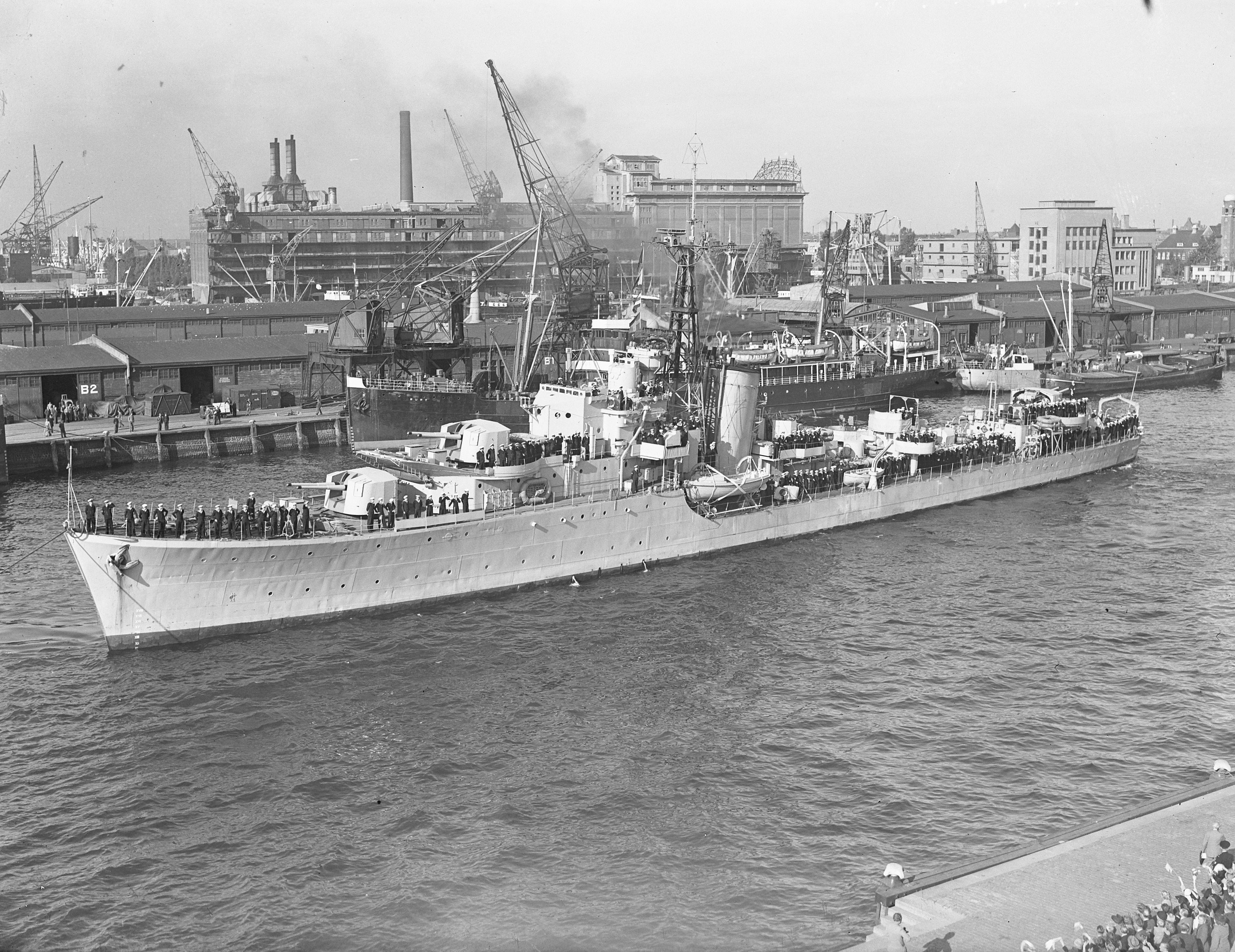 Collectie / Archief : Fotocollectie Anefo Reportage / Serie : [ onbekend ] Beschrijving : Aankomst Tjerk Hiddes in Rotterdam Datum : 1 oktober 1949 Locatie : Rotterdam, Zuid-Holland Trefwoorden : AANKOMSTEN Persoonsnaam : Hiddes, Tjerk Fotograaf : Winterbergen, […] / Anefo Auteursrechthebbende : Nationaal Archief Materiaalsoort : Glasnegatief Nummer archiefinventaris : bekijk toegang 2.24.01.09 Bestanddeelnummer : 903-6348